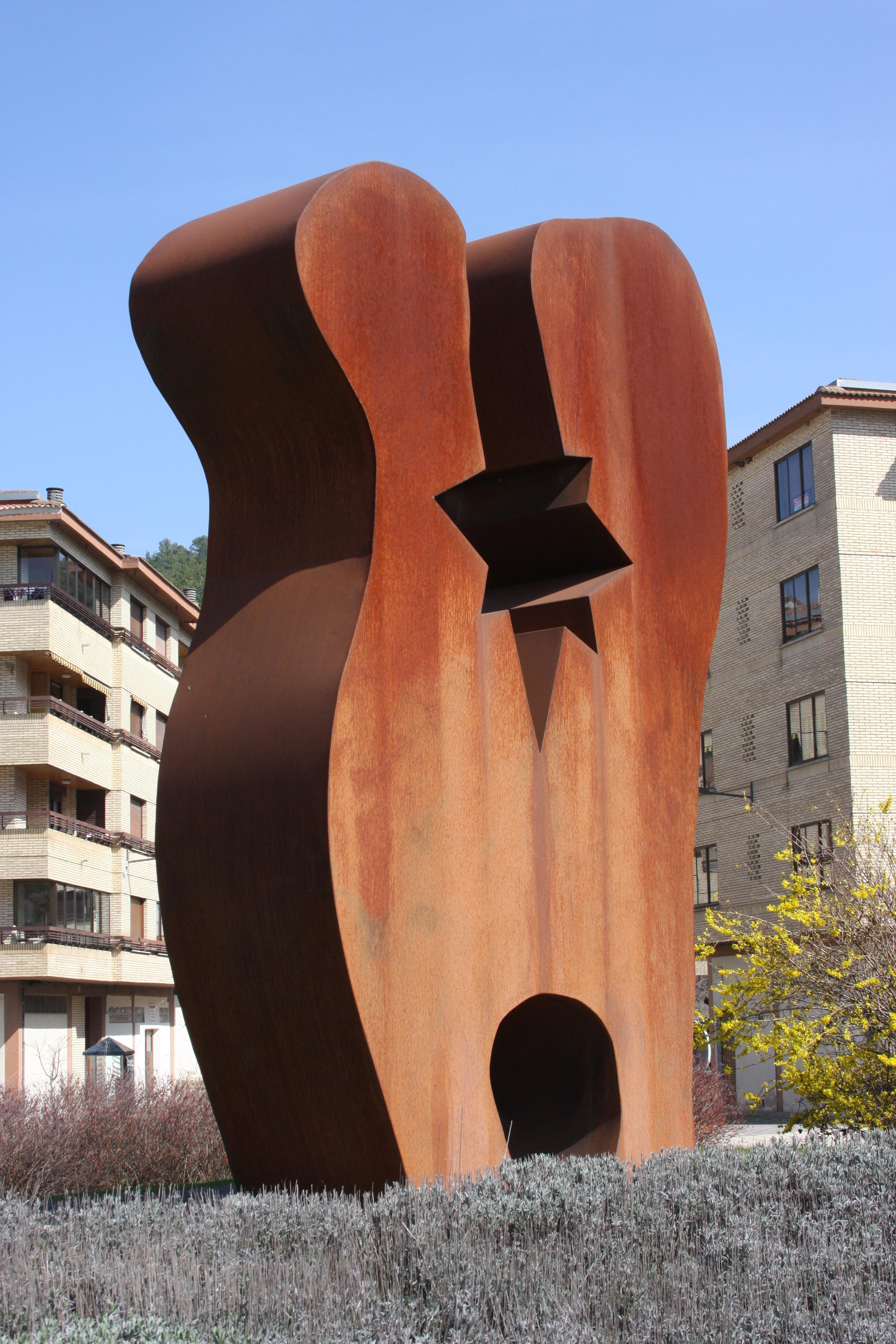 Escultura Stella